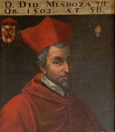 Retrato del cardenal Diego Hurtado de Mendoza (1444-1502), que fue arzobispo de Sevilla y obispo de Palencia.